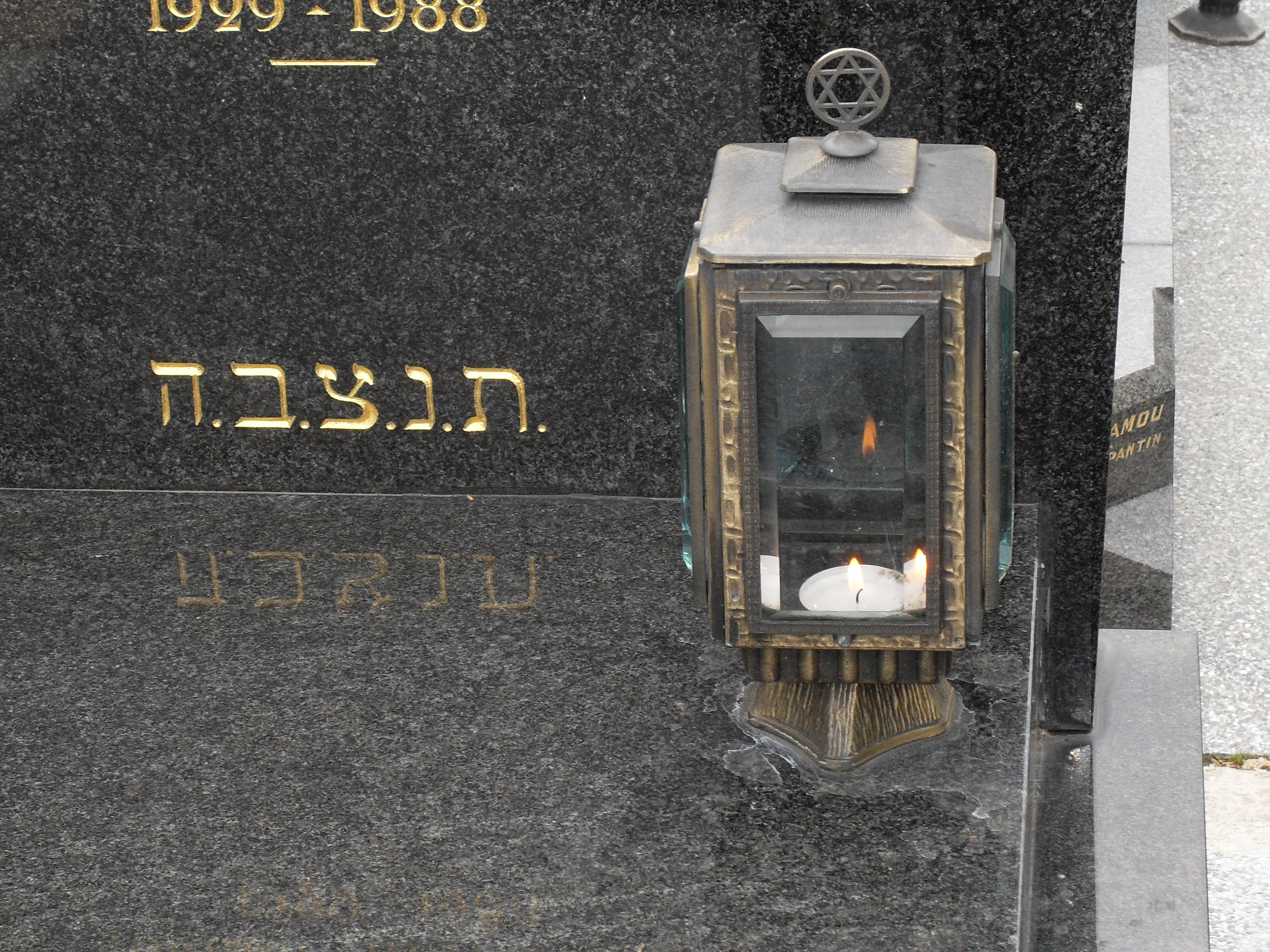 fr : France, Versailles, Yvelines (78) - CIMETIERE ISRAELITES - lanterne et inscription en hébreu תַּנְצְבָּ״ה , acronyme de תּהְיֶה נִשְׁמָתוֹ ou תְּהֵא נַפְשׁוֹ צְרוּרָה בִּצְרוֹר הַחַיִּים , que son âme soit reliée au faisceau de la vie! (d'après 1. Sam 25,29)